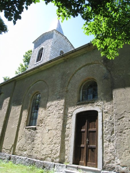 Саграђен 1876.год. уз потпору владе Аустро-Угарске.